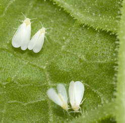 "San Pedro, Provincia de Buenos Aires Adultos de la mosca blanca de los invernáculos, (Trialeurodes vaporariorum) en hoja de zapallito de tronco "